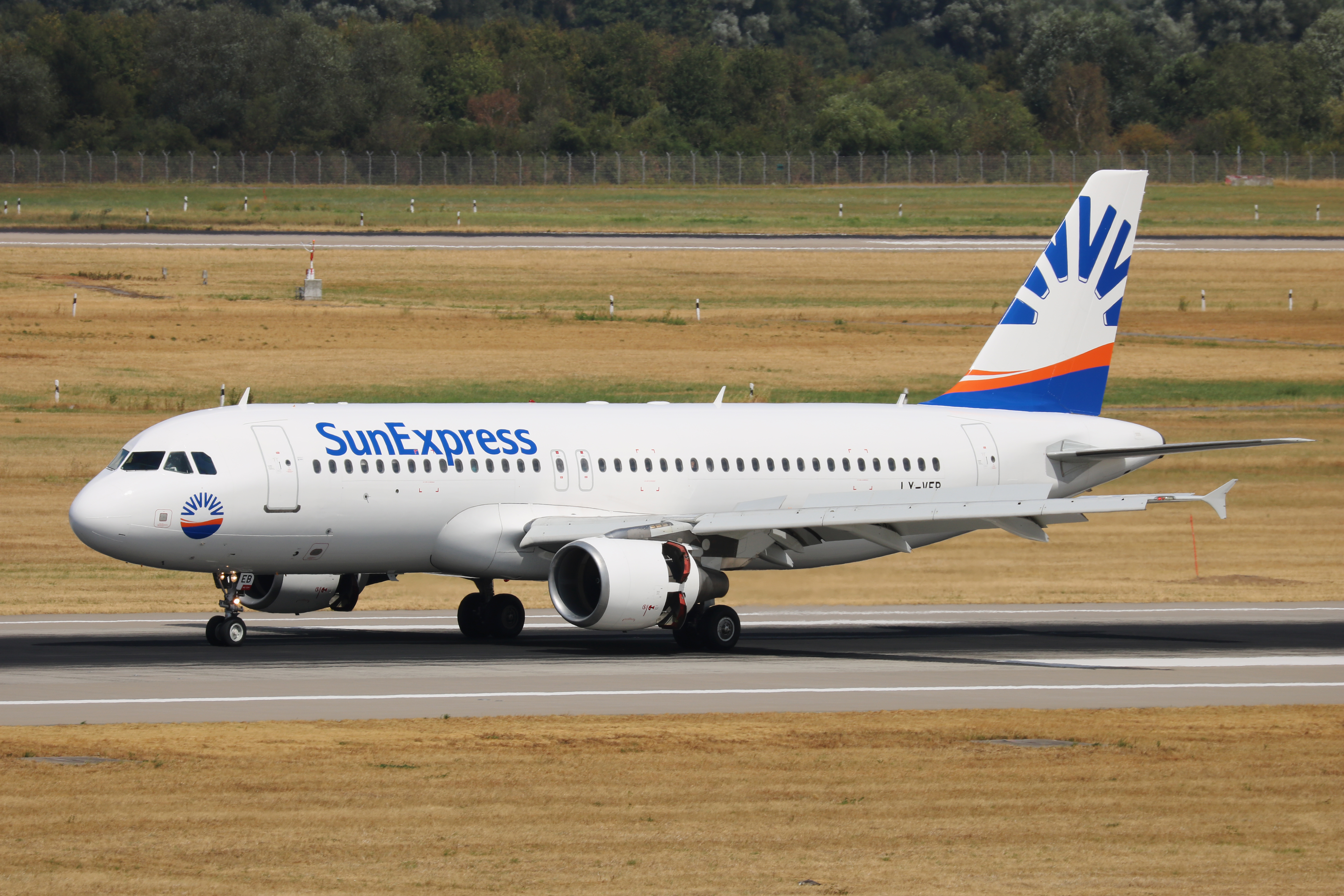 Flughafen Düsseldorf, Airbus A320-200 (LY-VEB) der SunExpress, temporär von Avion Express geleast